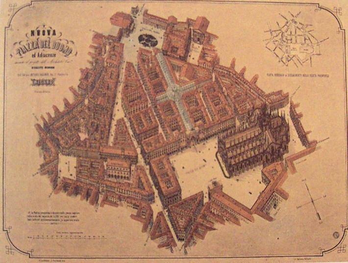 Il progetto di Giuseppe Mengoni per la ricostruzione di Piazza Duomo a Milano (15 settembre 1863).